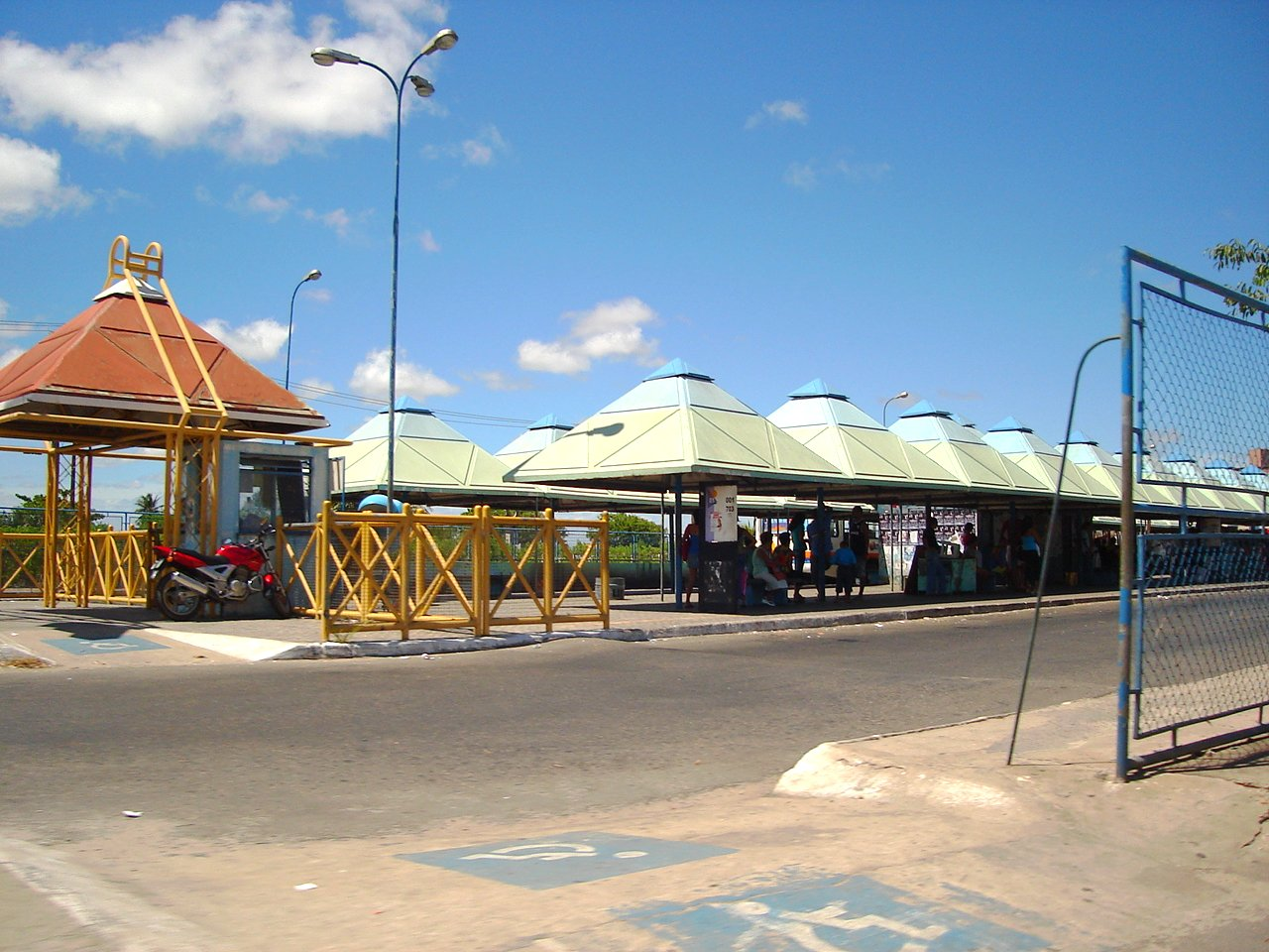 Terminal DIA de Aracaju, Brasil